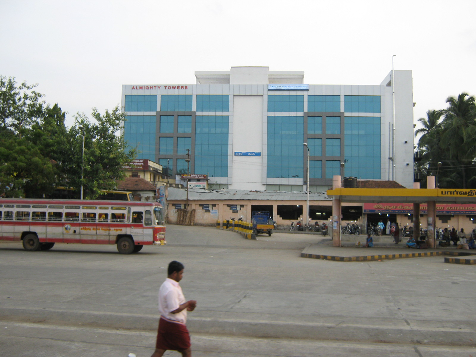 Tamil Nadu, India.